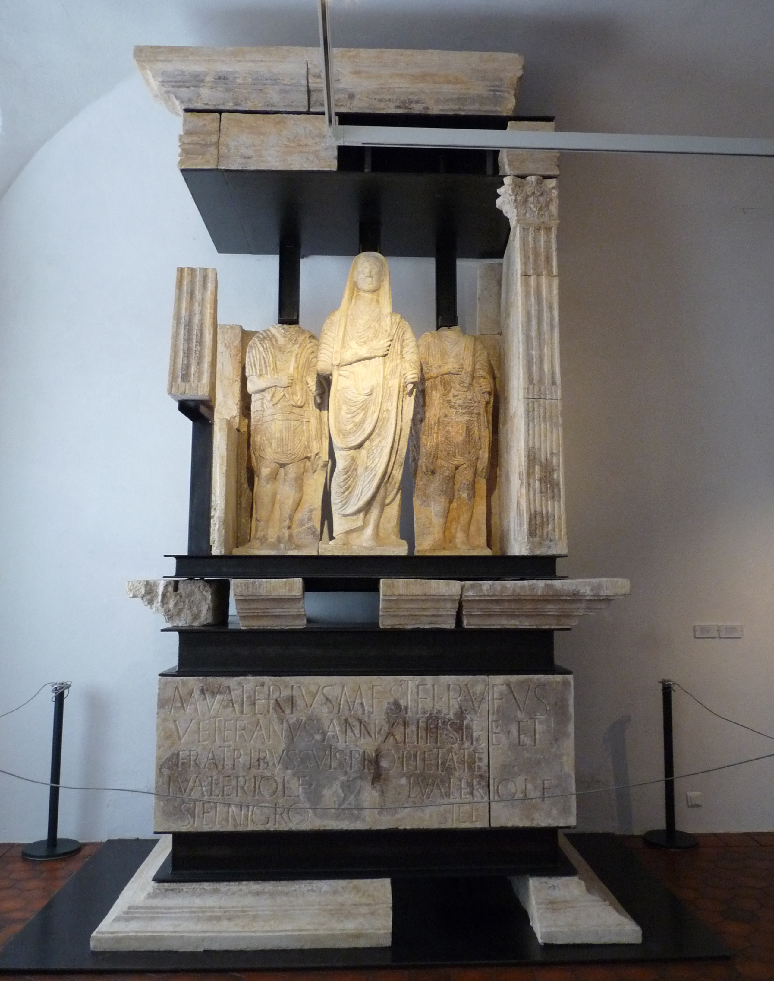 Mausolée funéraire du vétéran Marcus Valerius Rufus et de ses "frères", en fait ses cousins, les légionnaires Lucius Valerius Niger et Lucius Valerius. Ménades dansantes sur les panneaux latéraux. Calcaire, première moitié du 1er siècle après JC (datation d'après la paléographie et l'emploi d'un datif archaïque "sibe" pour "sibi"). Texte latin : «M(arcus) Va[le]rius M(arci) f(ilius) Stel(latina tribu) Rufus / ue[te]ranus ann(orum) XLIII sibe et / fratribus suis pro pietate, // L(ucio) Valerio L(ucii) f(ilio) / Stel(latina tribu) Nigro // L(ucio) Valerio L(ucii) f(ilio) / Stel(latina tribu) [...]» Exhumé en 1998 à Strasbourg Koenigshoffen (rue du Donon) lors de fouilles de l'INRAP. Musée archéologique de Strasbourg. Référence : AE 2000, n°1064